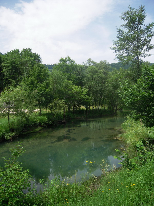 Rijeka Krupa